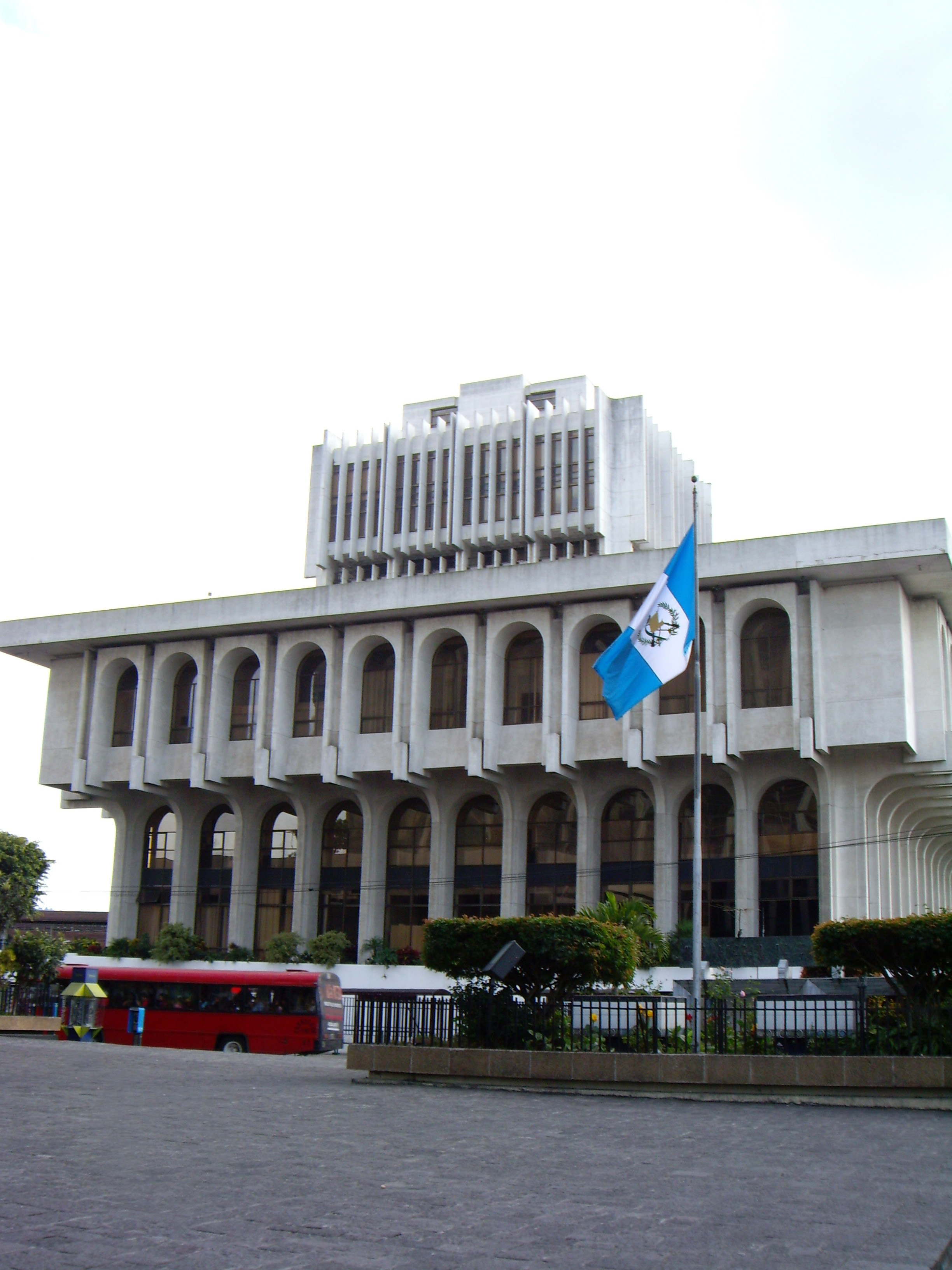 Edificio corte Suprema de Justicia, Centro Cívico Zona , Ciudad Guatemala